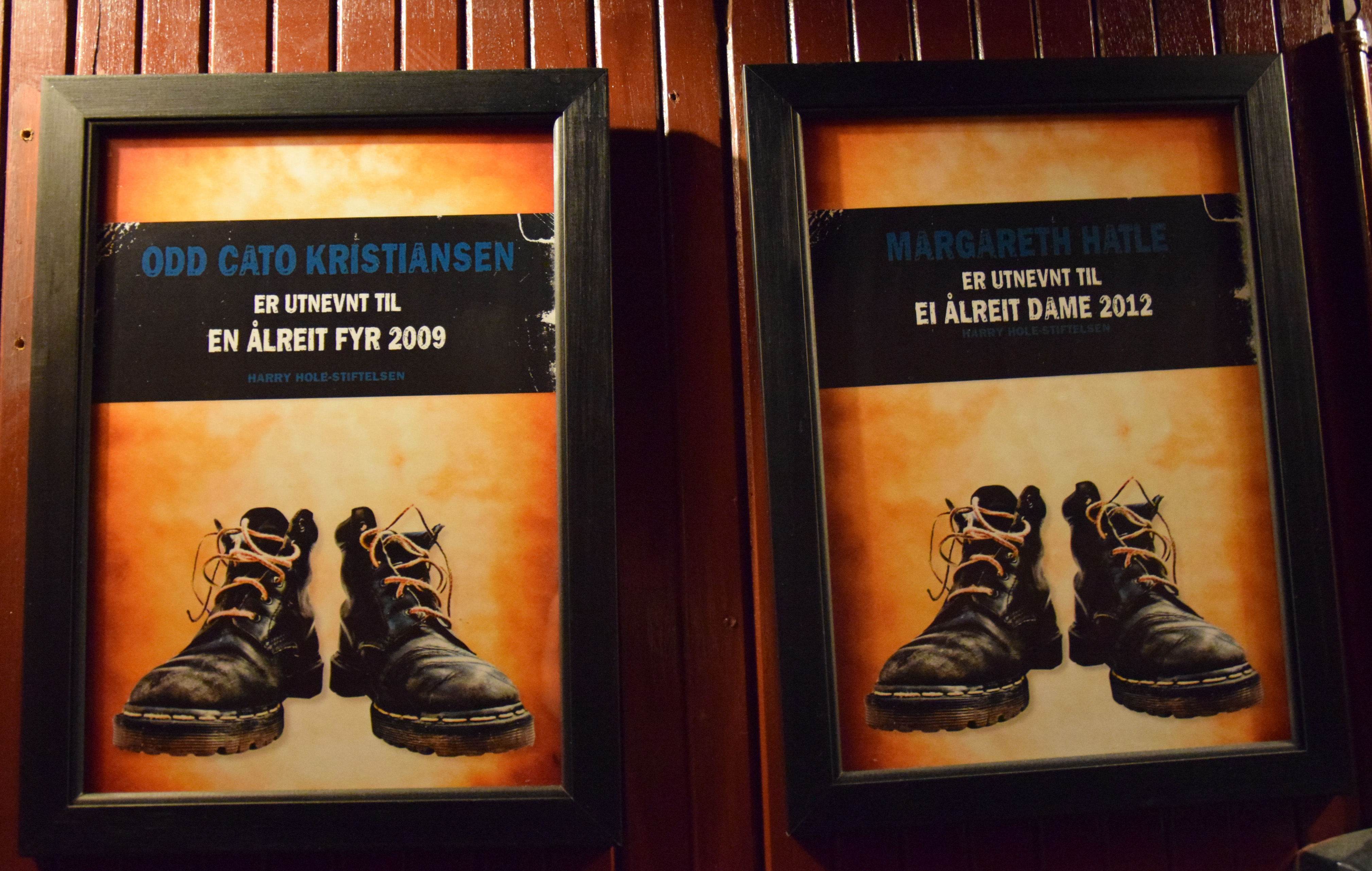 Prisene En ålreit fyr / Ei ålreit dame som forfatteren Jo Nesbø deler ut i Restaurant Schrøder på St. Hanshaugen i Oslo hvert år. Bildet er tatt i restauranten. Publisert med tillatelse fra Restaurant Schrøder.